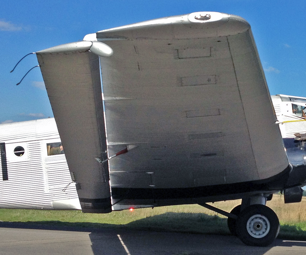 Junkers Doppelflügel an einer Ju 52 3M auf dem Flugplatz Oberschleißheim. Gut sichtbar im Schatten des Flügels: Der Luftschlitz zwischen Tragfläche und Hilfsflügel.